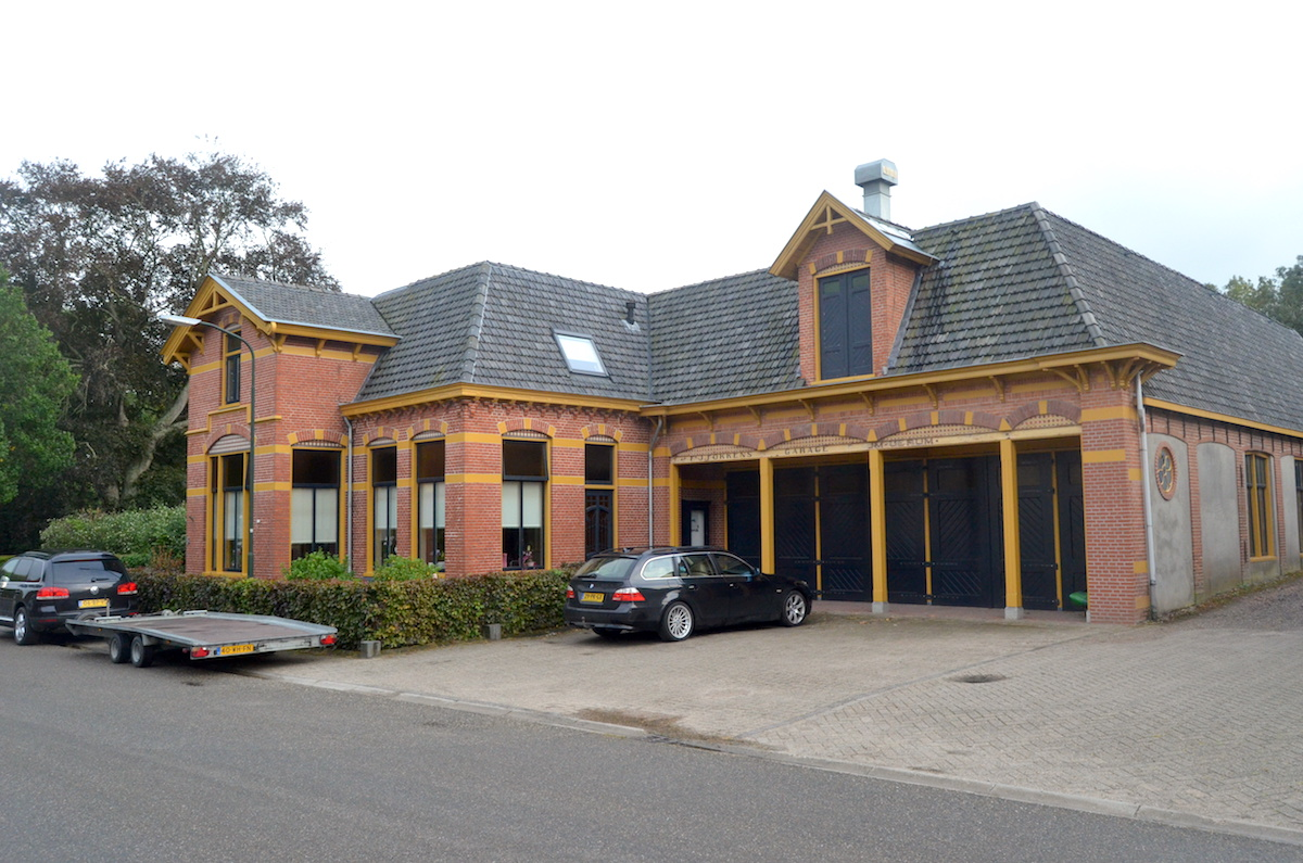 Voormalige tramremise te Wehe van de 'Tramweg-Maatschappij Winsum - Ulrum'. Foto: Erik Swierstra.